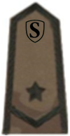 Młodszy Chorąży ZS